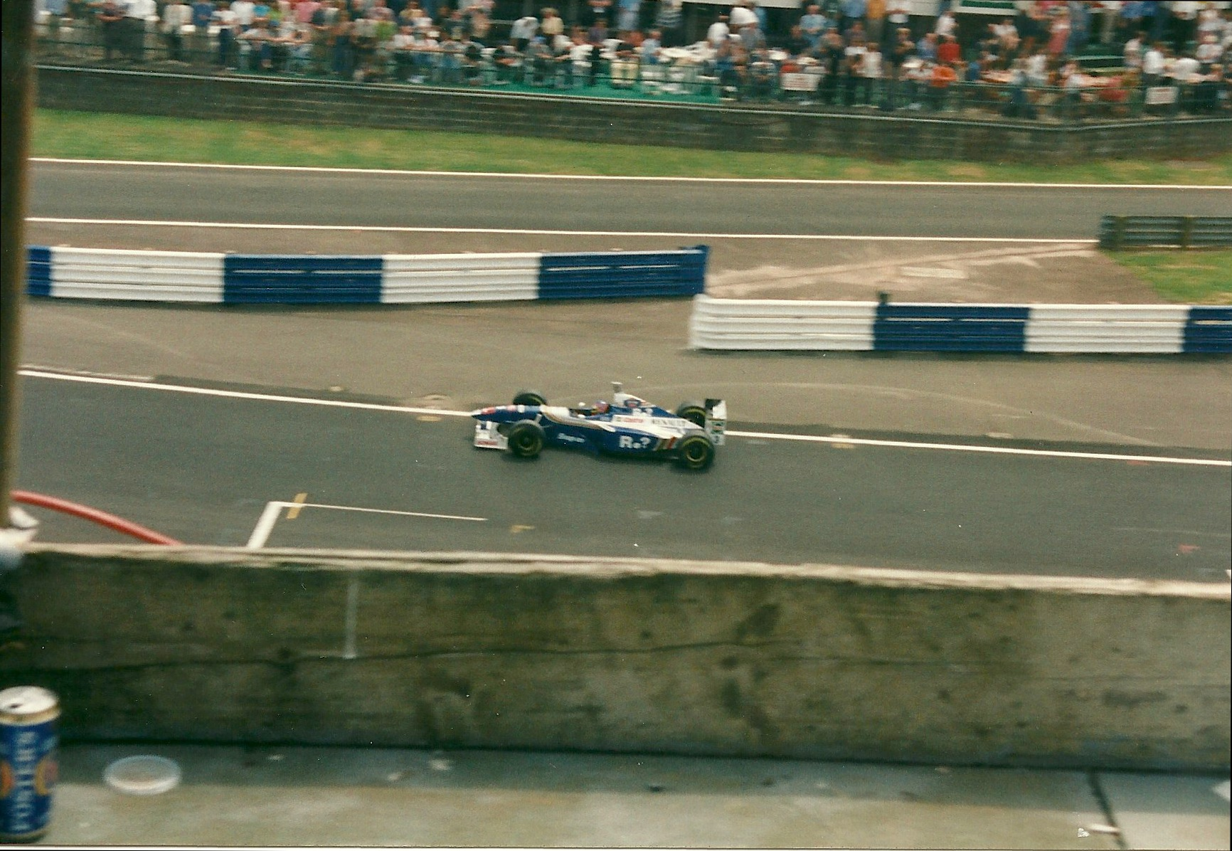 Jacques Villeneuve lors du Grand Prix de Grande-Bretagne 1997 à bord de la WilliaMs FW19